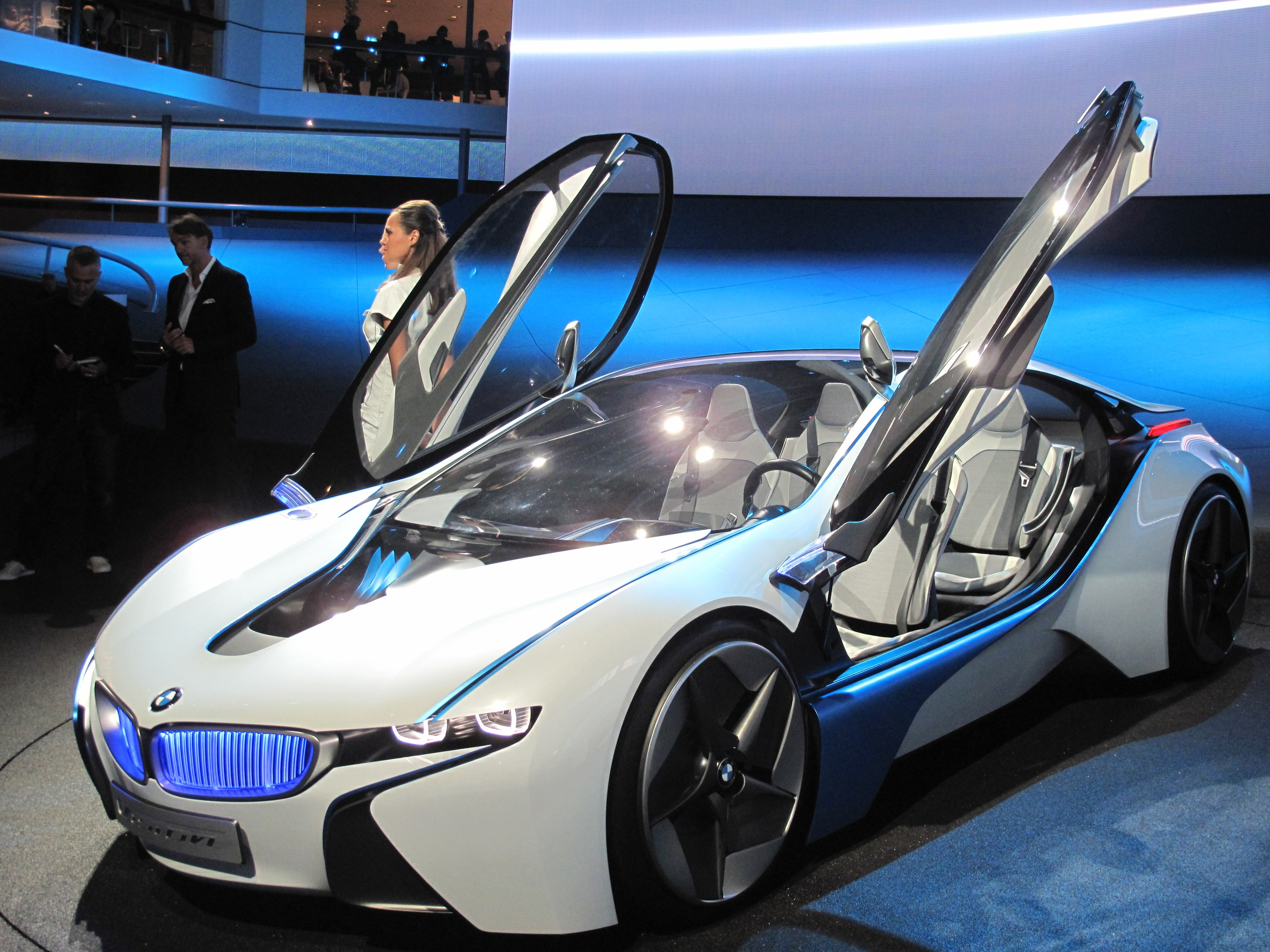 IAA 2009